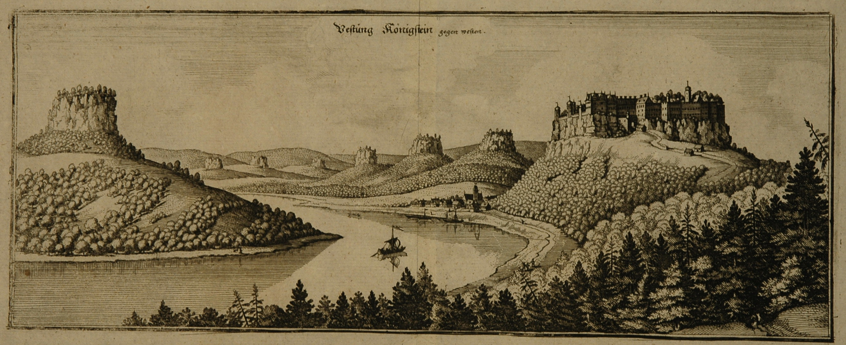 Kupferstich 13,5 x 35 cm von Merian um 1650